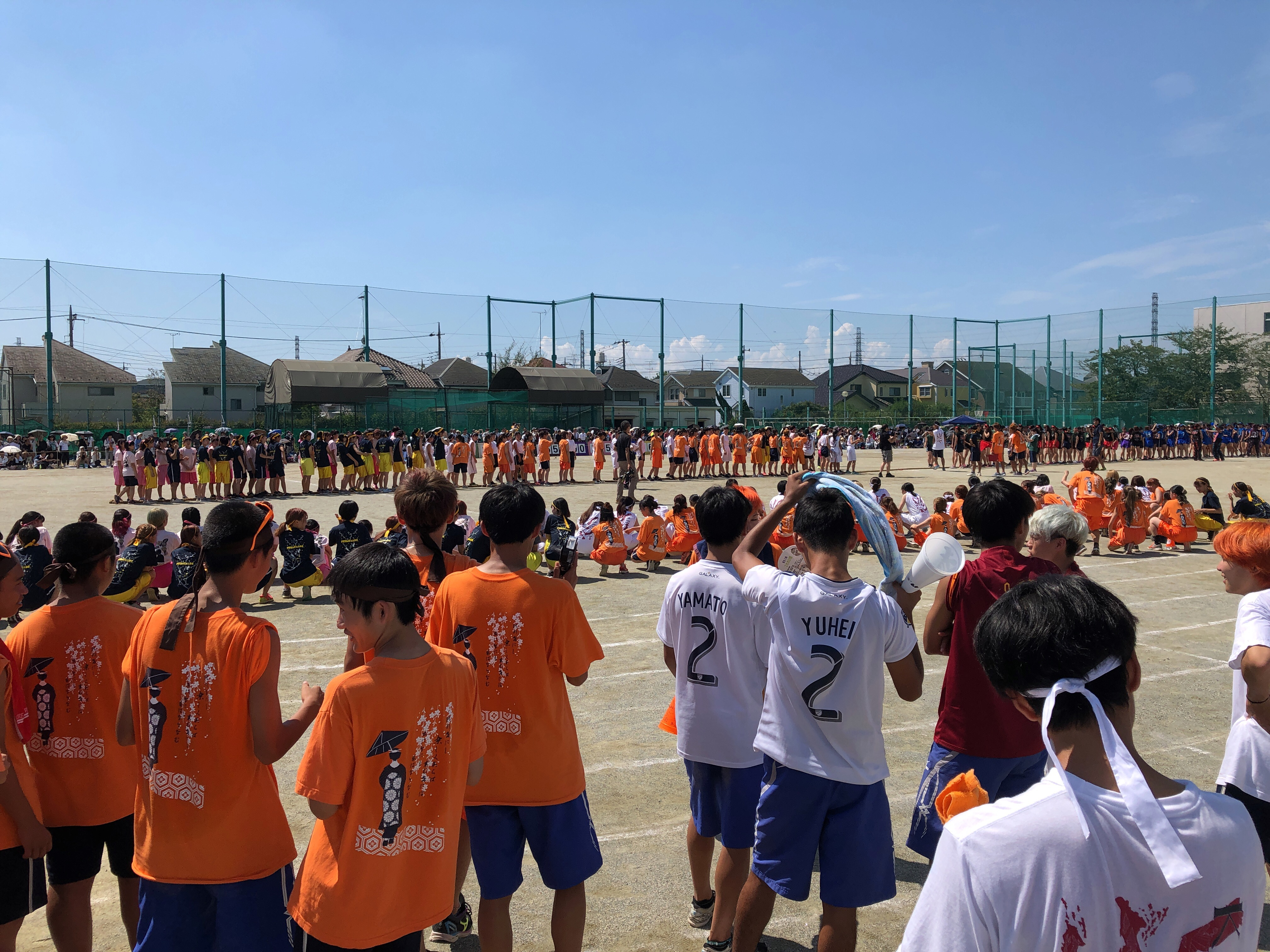 国分寺高校の写真だよ。